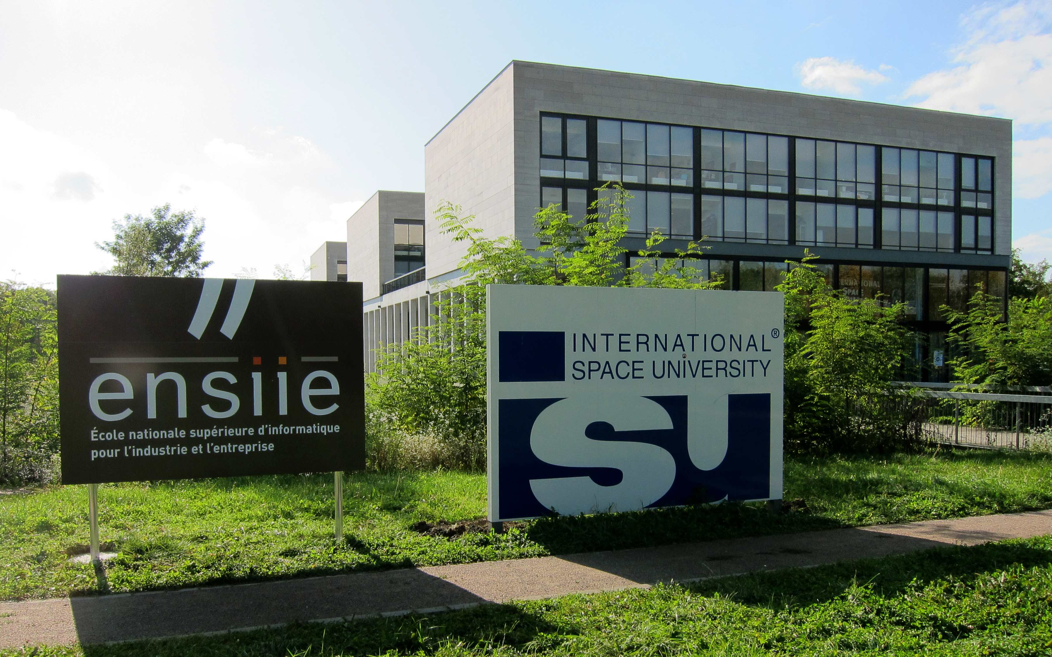 Bâtiment de l'ISU occupé également par l'ENSIIE Strasbourg.